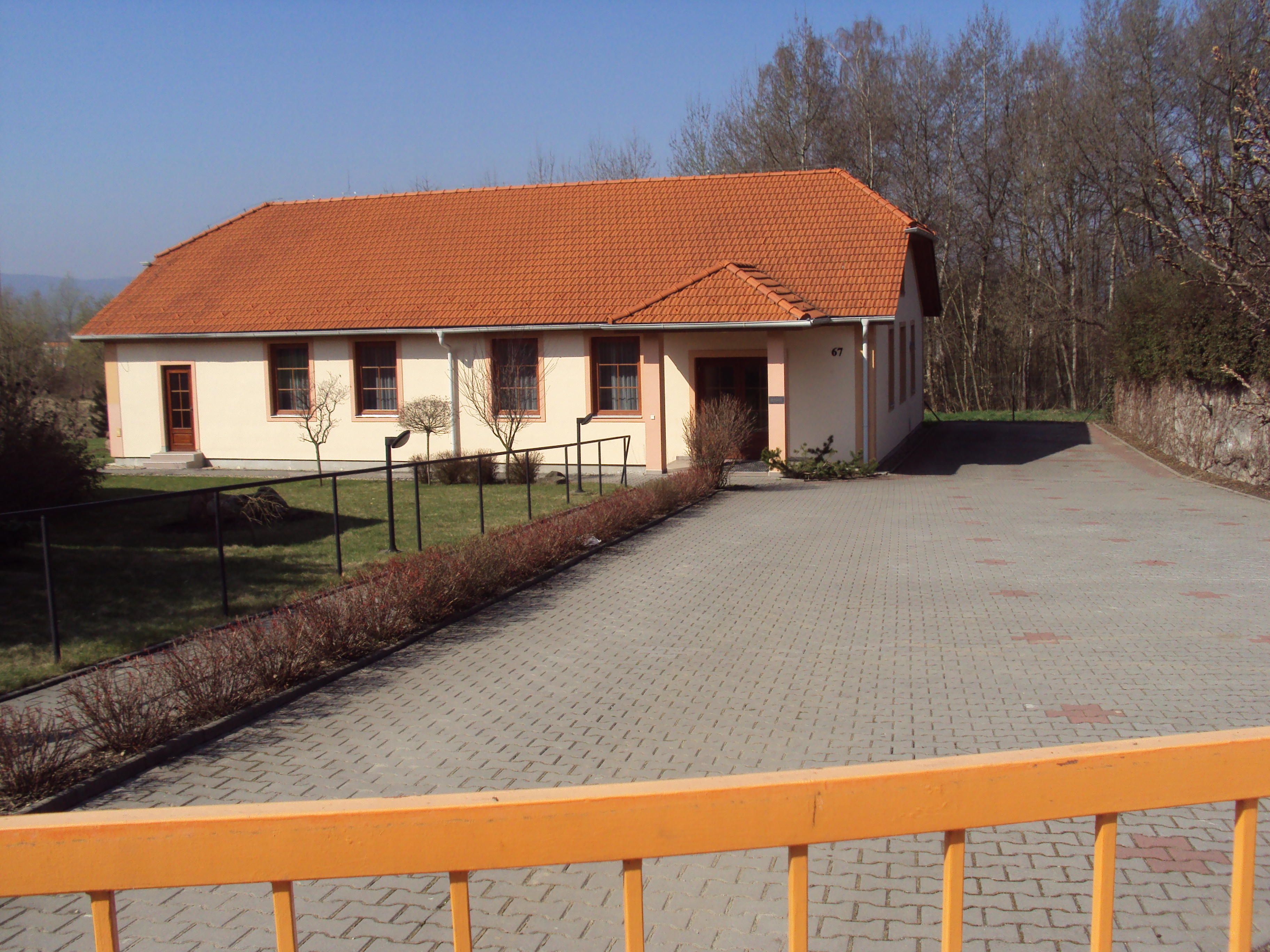 Sál Království svědků Jehovových na Ladech v České Lípě zpředu, popsán na stěně od zahrady